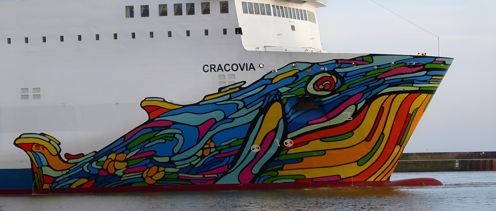 Fraktfärjan M/S Cracovia med målning av den polske konstnären Mariusz Waras. Ystads hamn 7 april 2018.